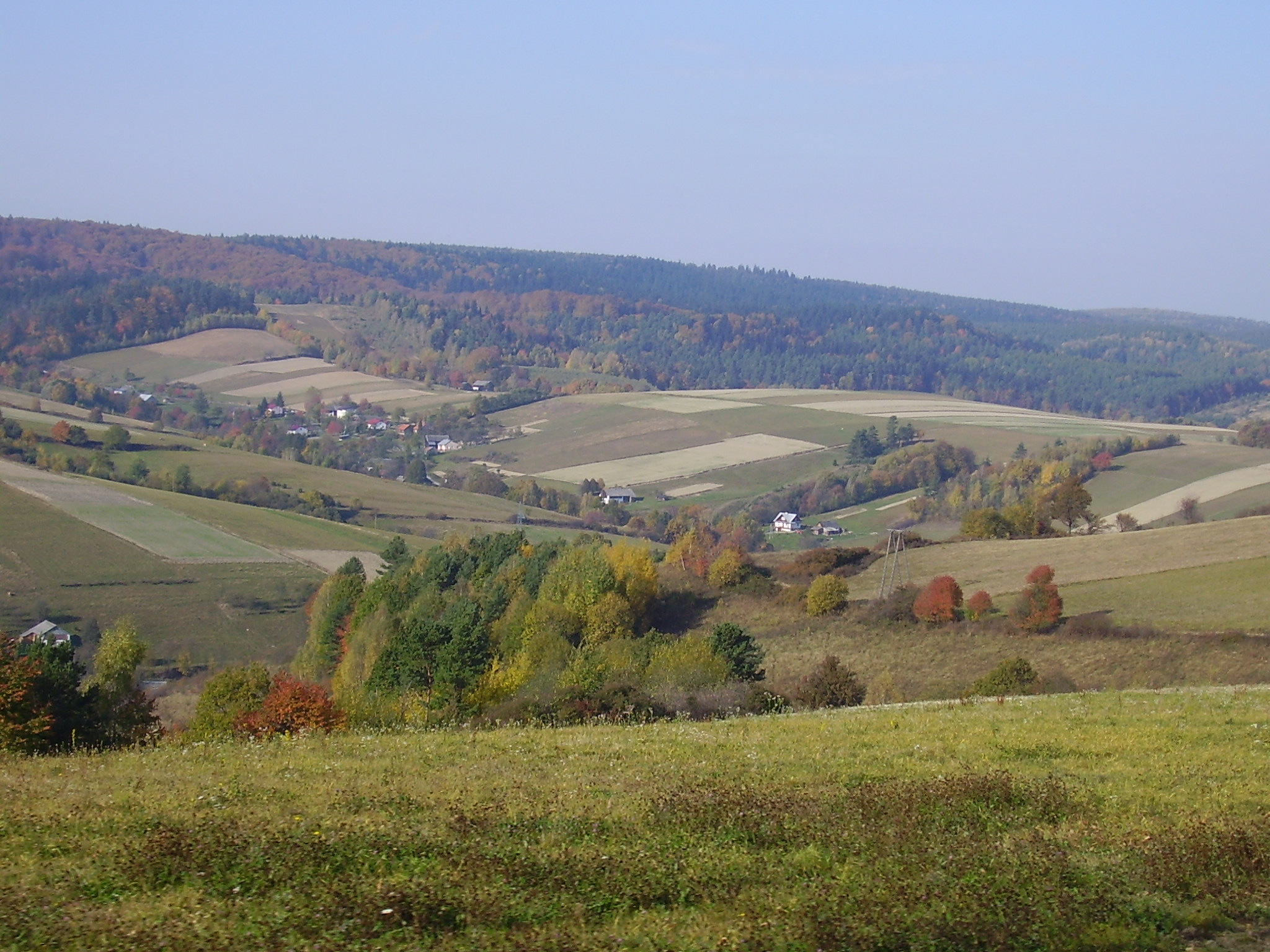 Widok na dolinę Leszczawki